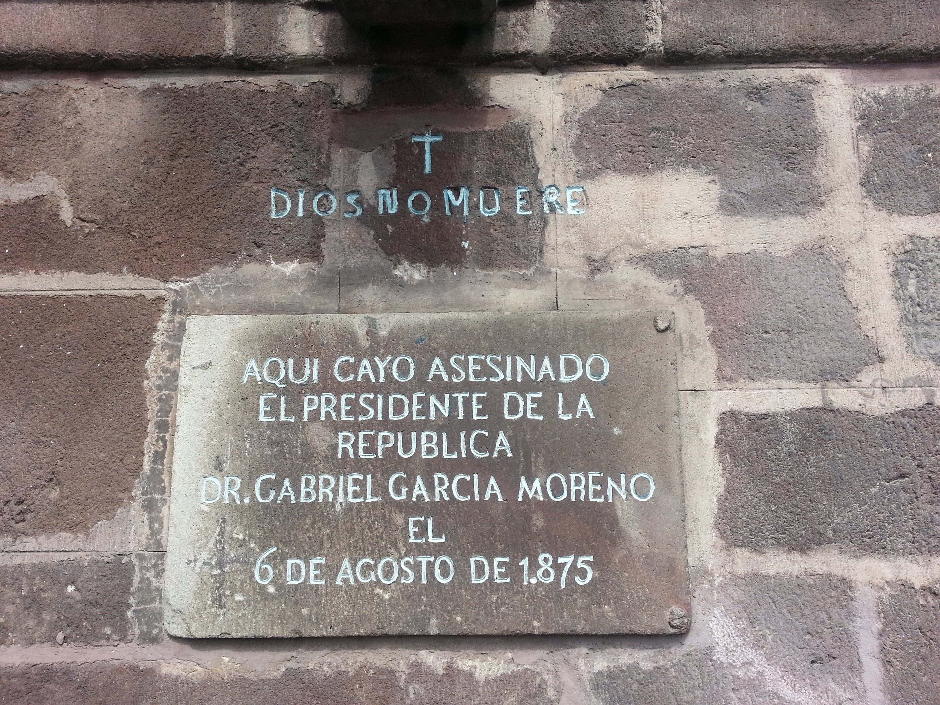 Placa en piedra en el lugar conocido históriacamente como el cual cayo muerto el presidente García Moreno